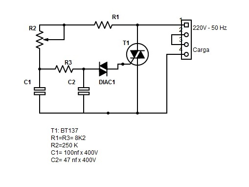 Circuito Dimmer (atenuador de luz) para una red de 220V - 50 Hz